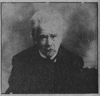 Teófilo Braga, deuxième président du Portugal qui signa l'entrée en guerre au côté des Alliés, WWI.